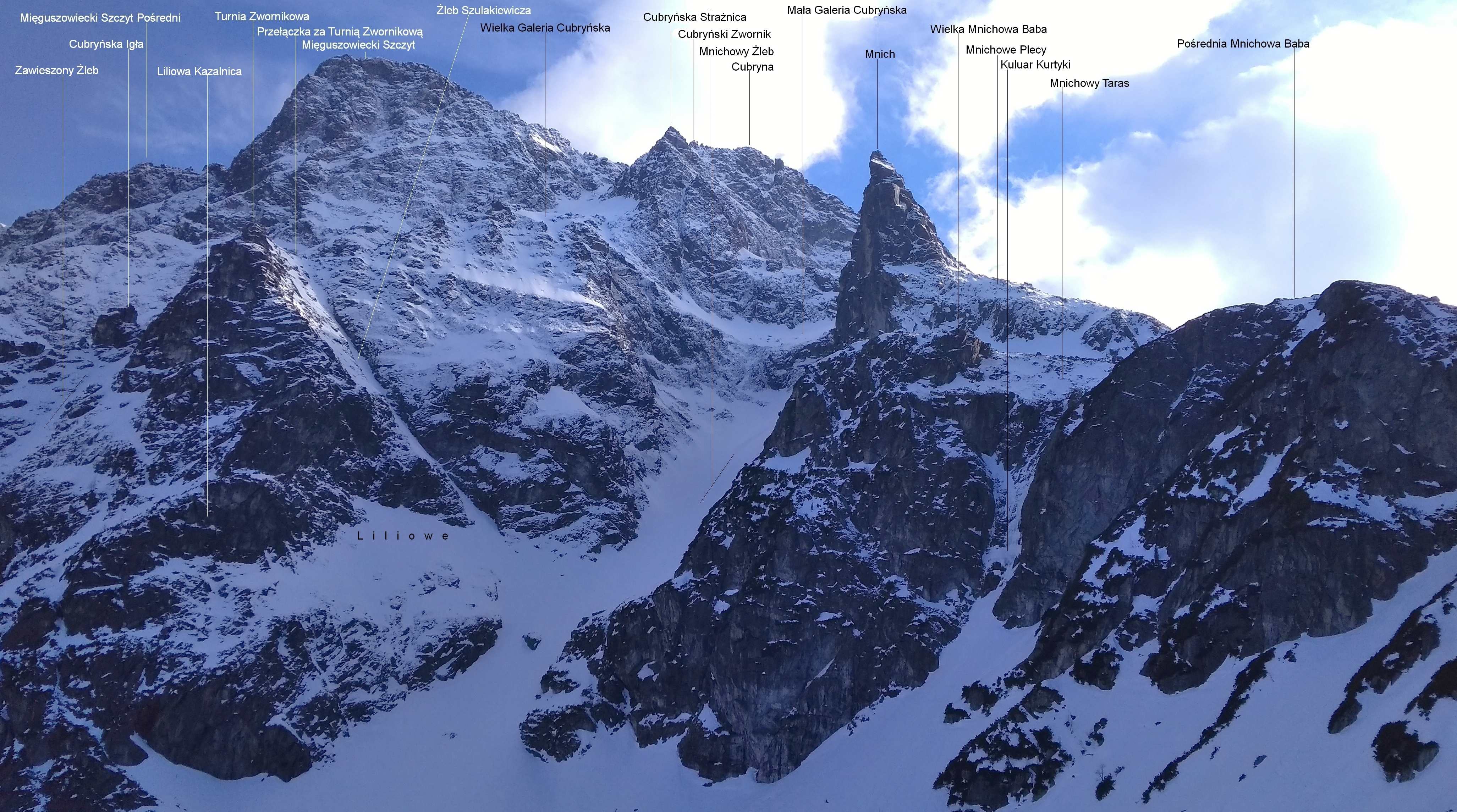 Masyw Szczytu Mięguszowieckiego Wielkiego, Cubryny i Mnicha